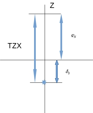 Meridionālais augstums